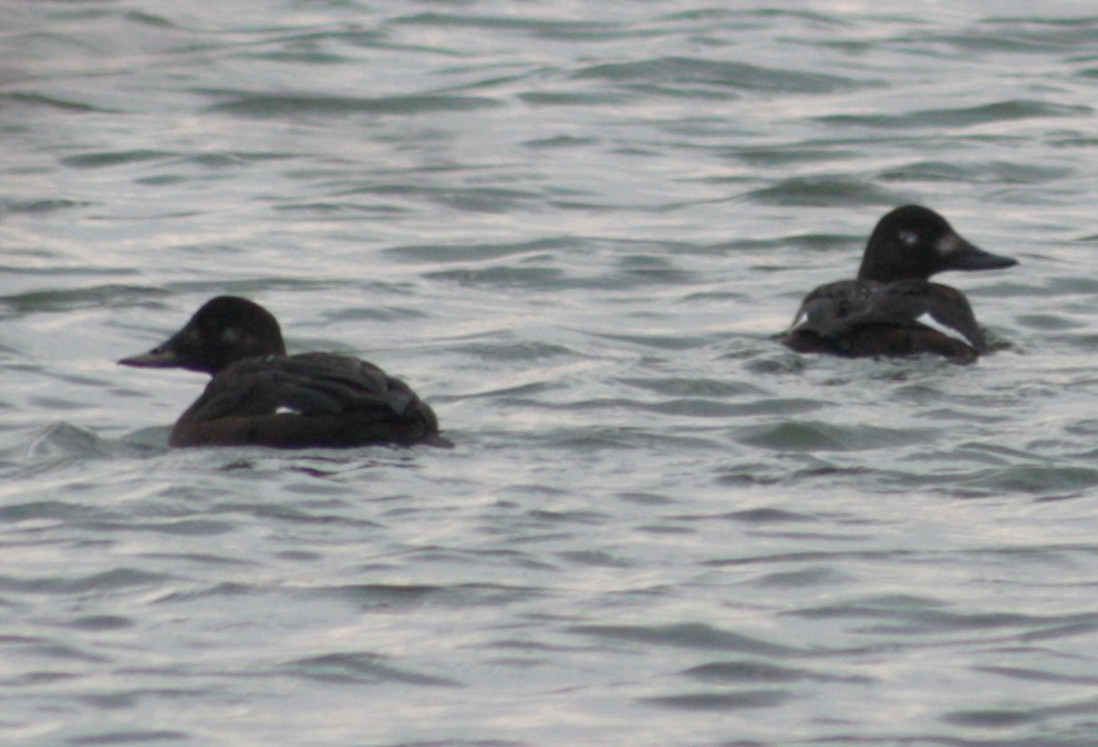 Macreuse brune / Velvet Scoter Melanitta fusca, females / immatures